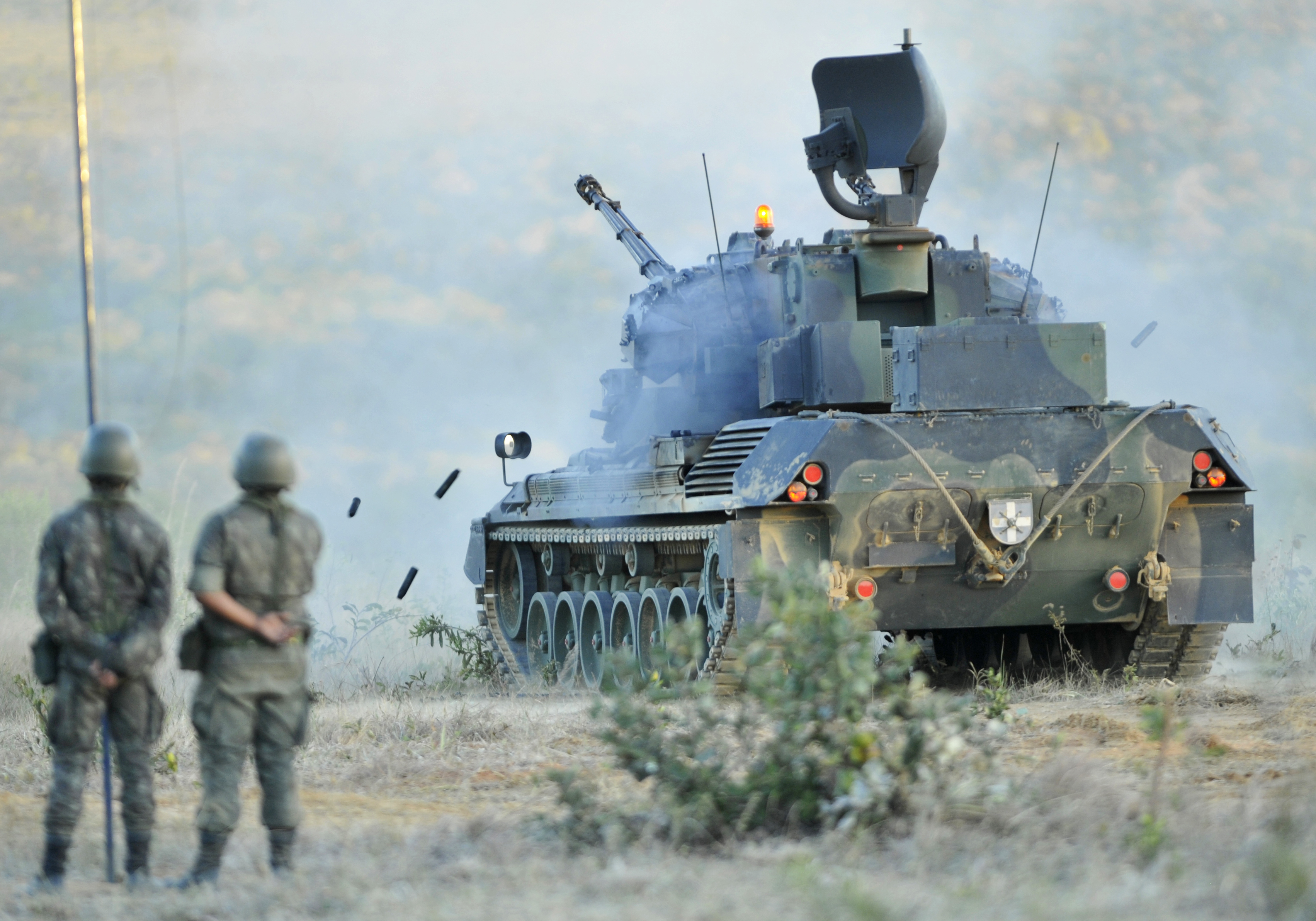 05/08/2015, Formosa - GO Fotos: Gilberto Alves